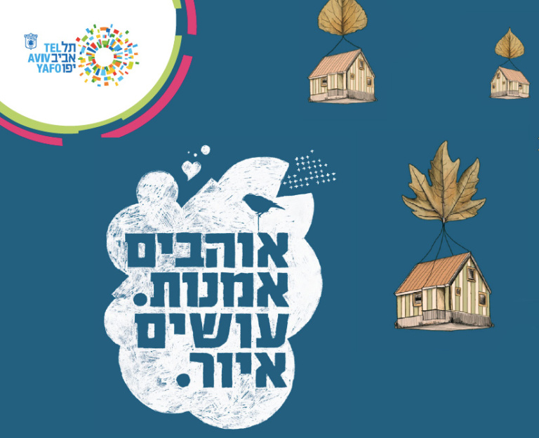 פוסטר הנושא של שבוע האיור